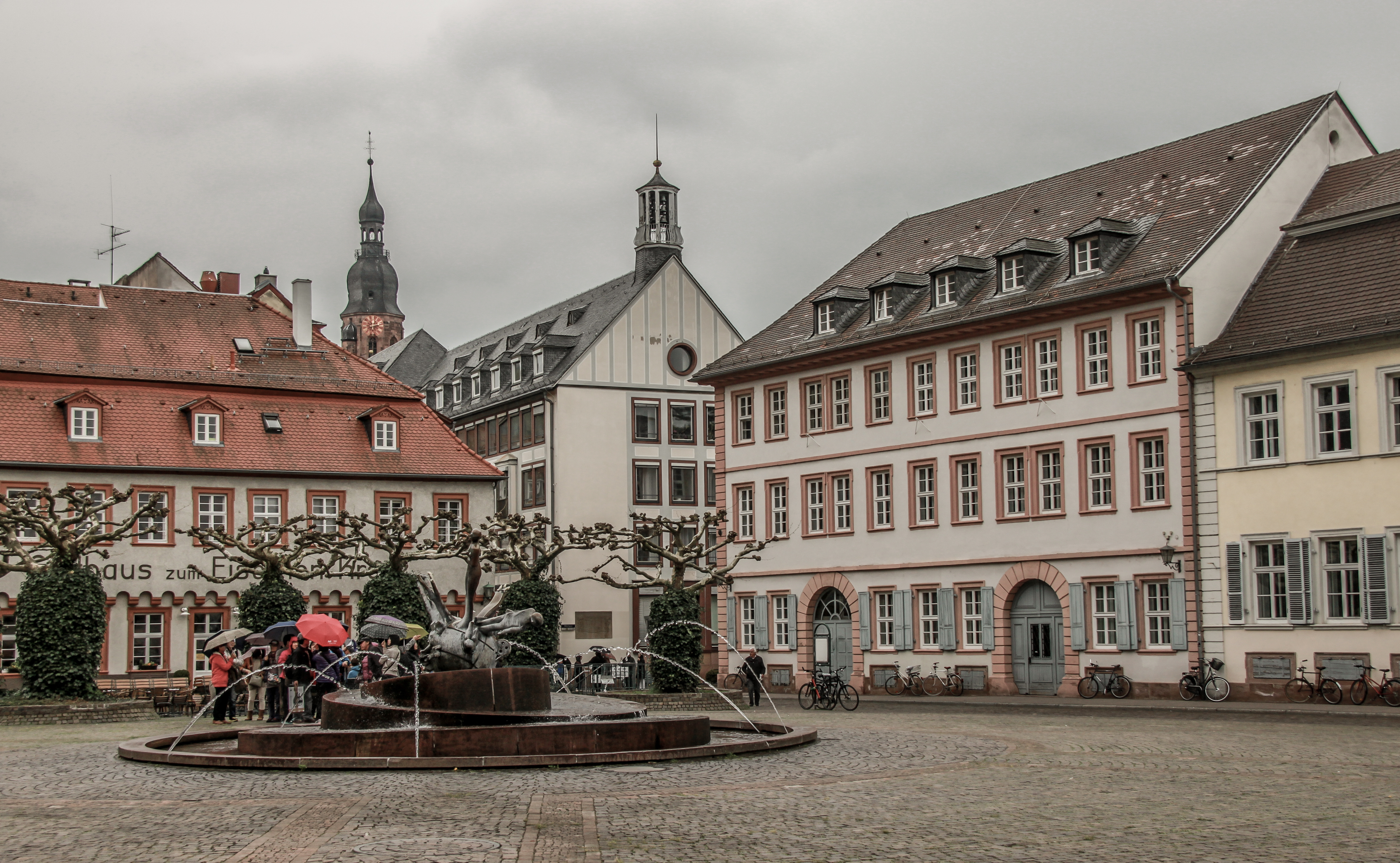 Heidelberg Hauptstraße 207